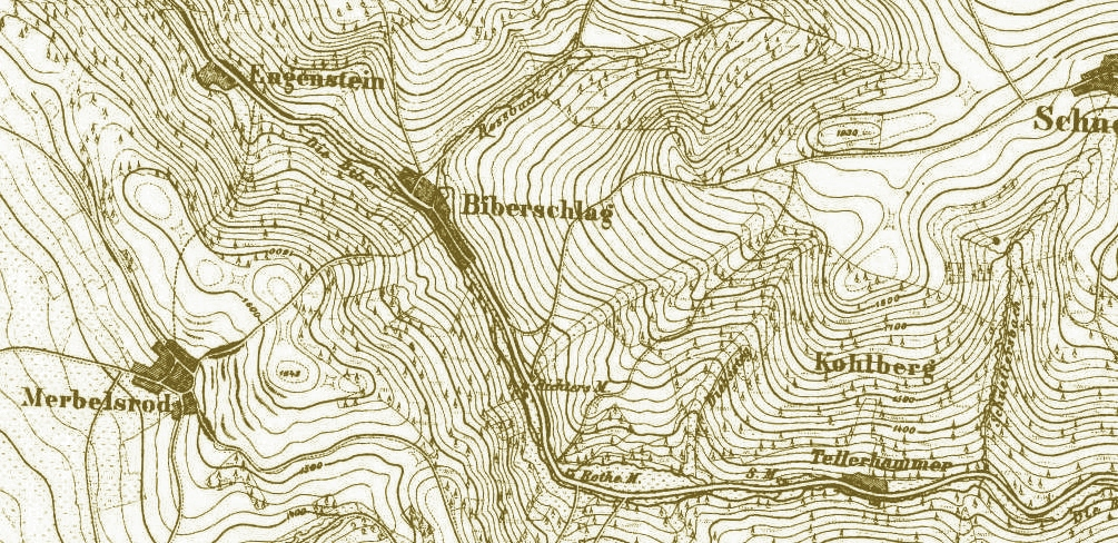 Ausschnitt des Ur-Messtischblattes mit den Ortsteilen im Bibergrund.